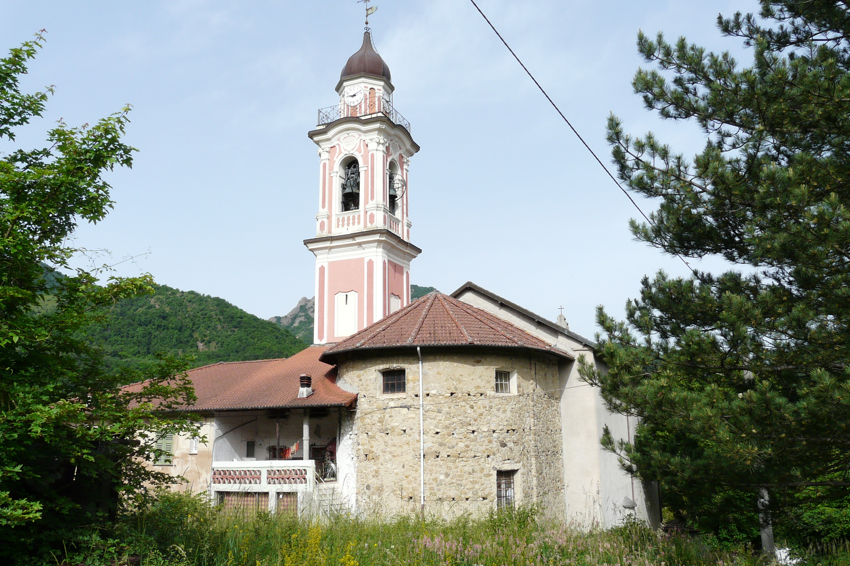 Chiesa di Nostra Signora delle Grazie, Vobbia, Liguria, Italia